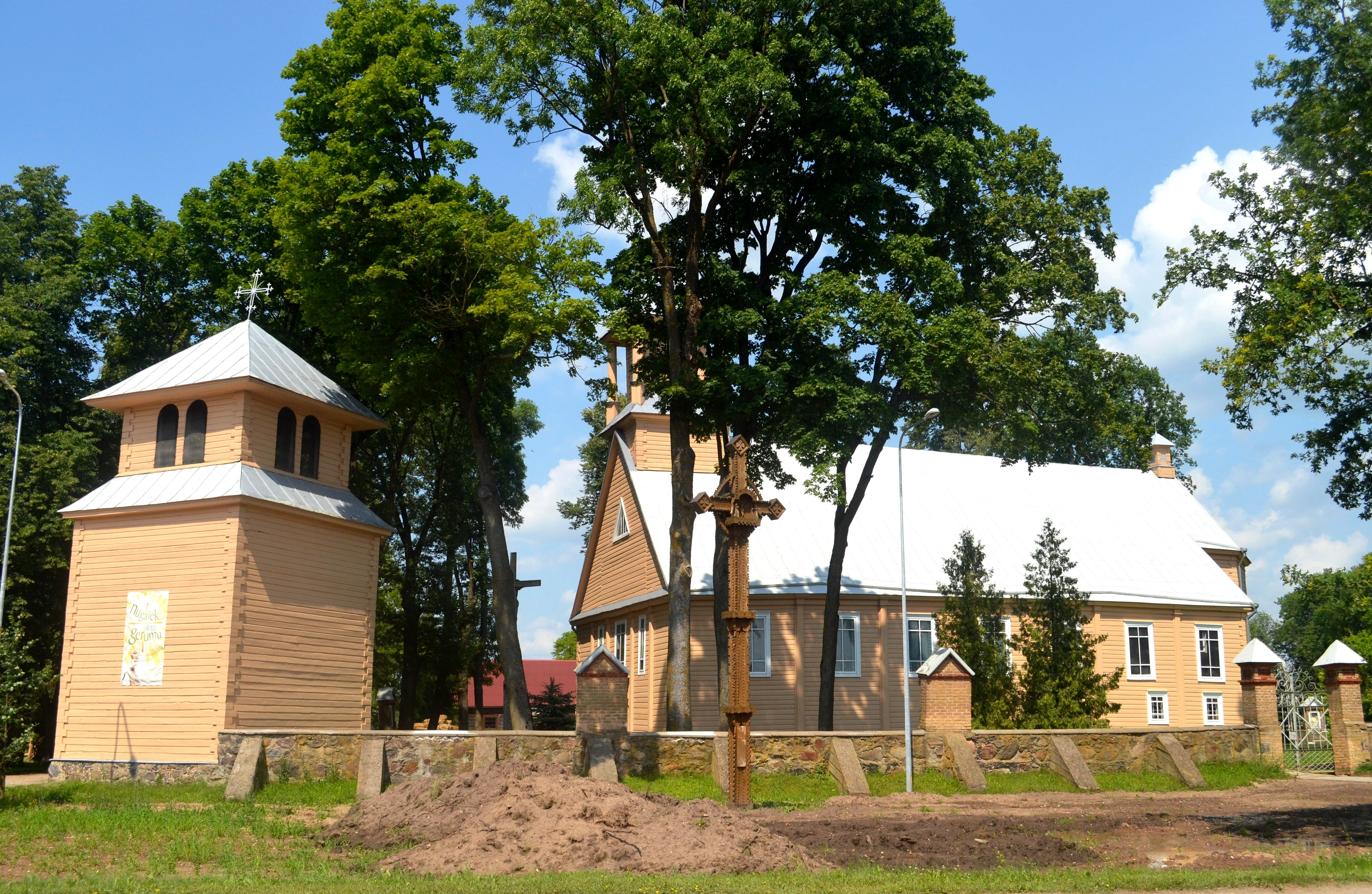 Deltuvos bažnyčia, Ukmergės raj.